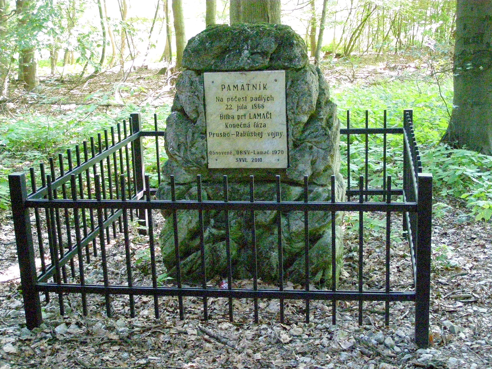 Pamätník bitky pri Lamači 22.7.1866 pod vrcholom Klanca (347 m n.m.)